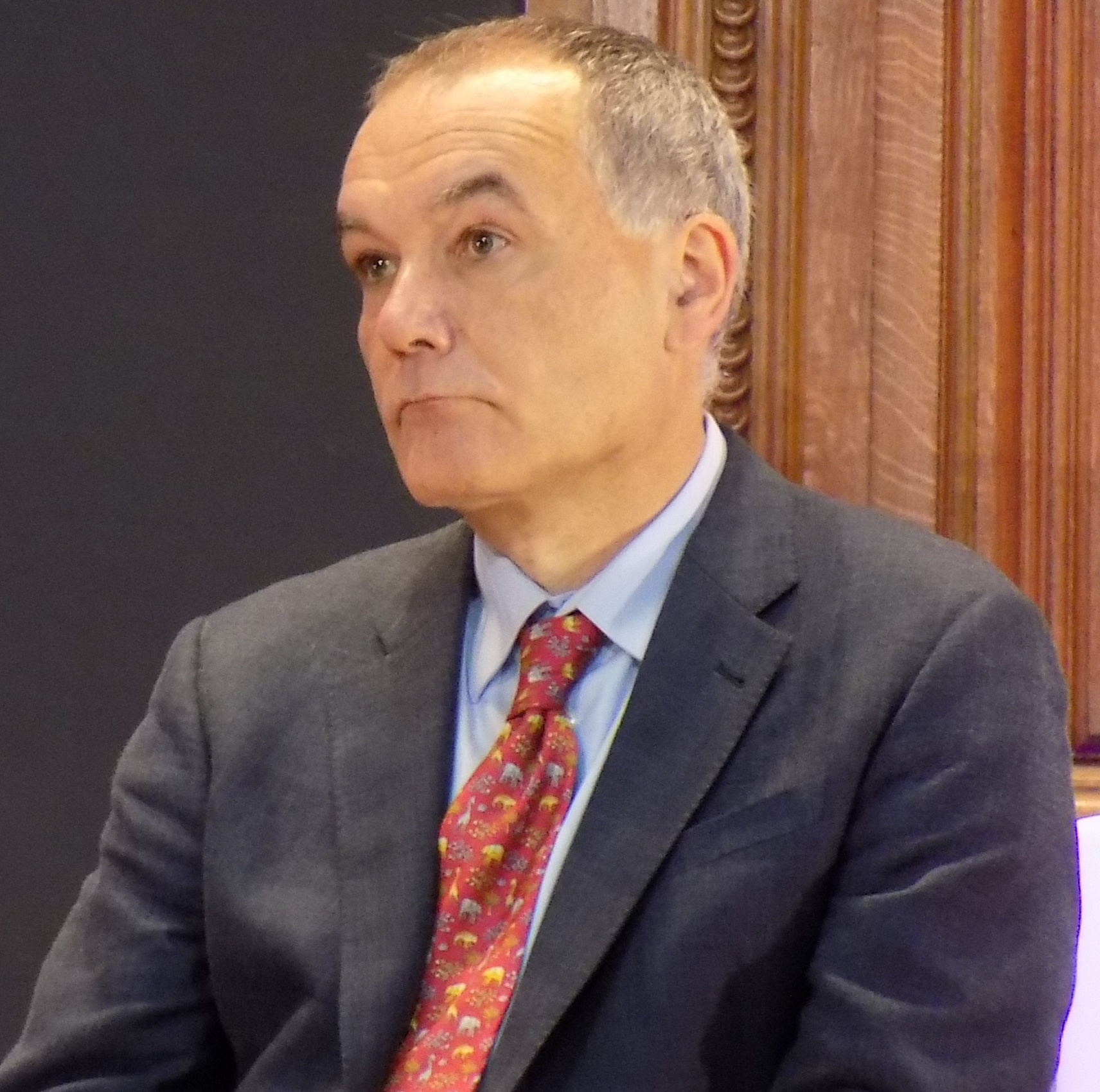 Jean-Pierre Filiu lors du forum « L’année vue par l’histoire » organisé par France Culture le 25 avril 2015